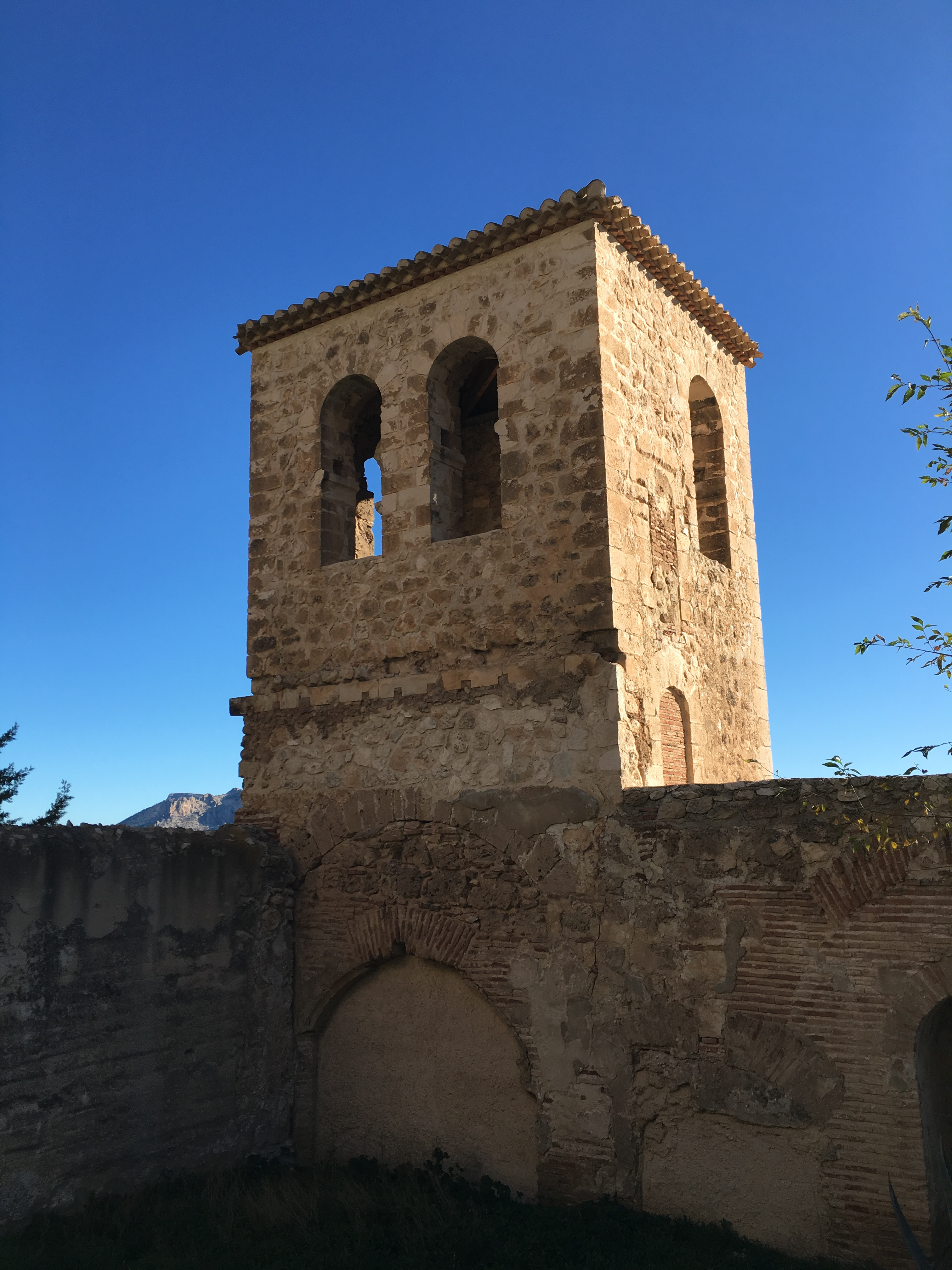 Vélez-Blanco